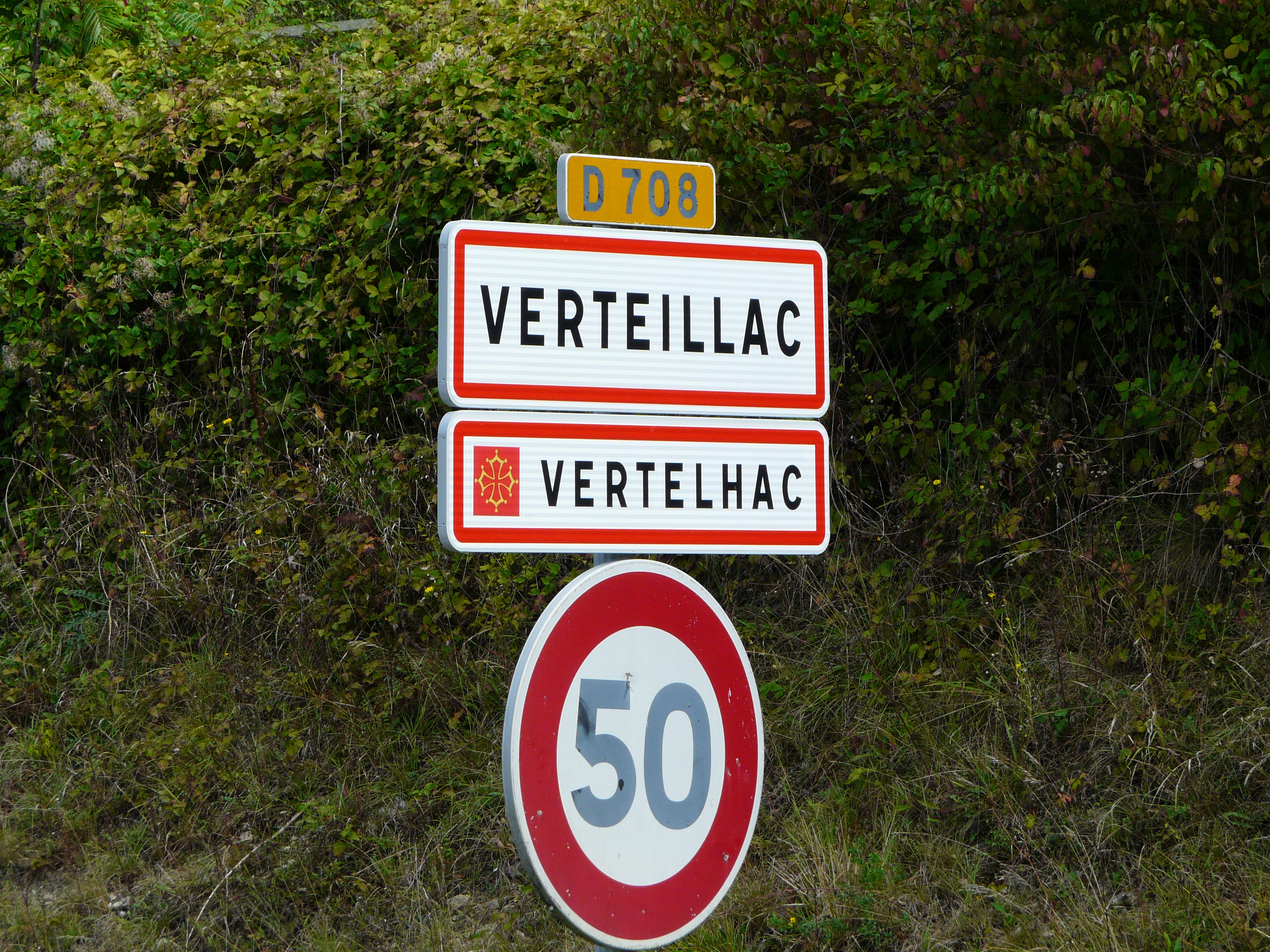 Panneau routier en français et occitan, Verteillac, Dordogne, France.